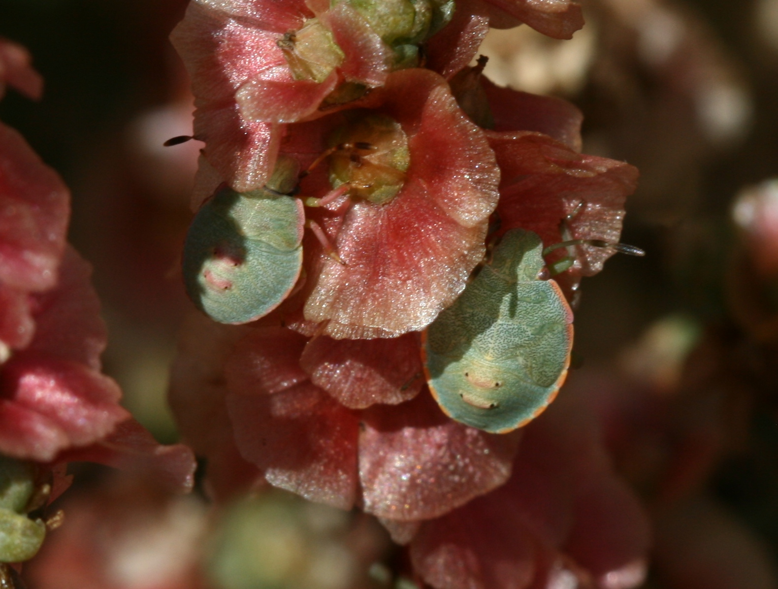 Feeding on Salsola marujae. Lajares, Fuerteventura, Spain.